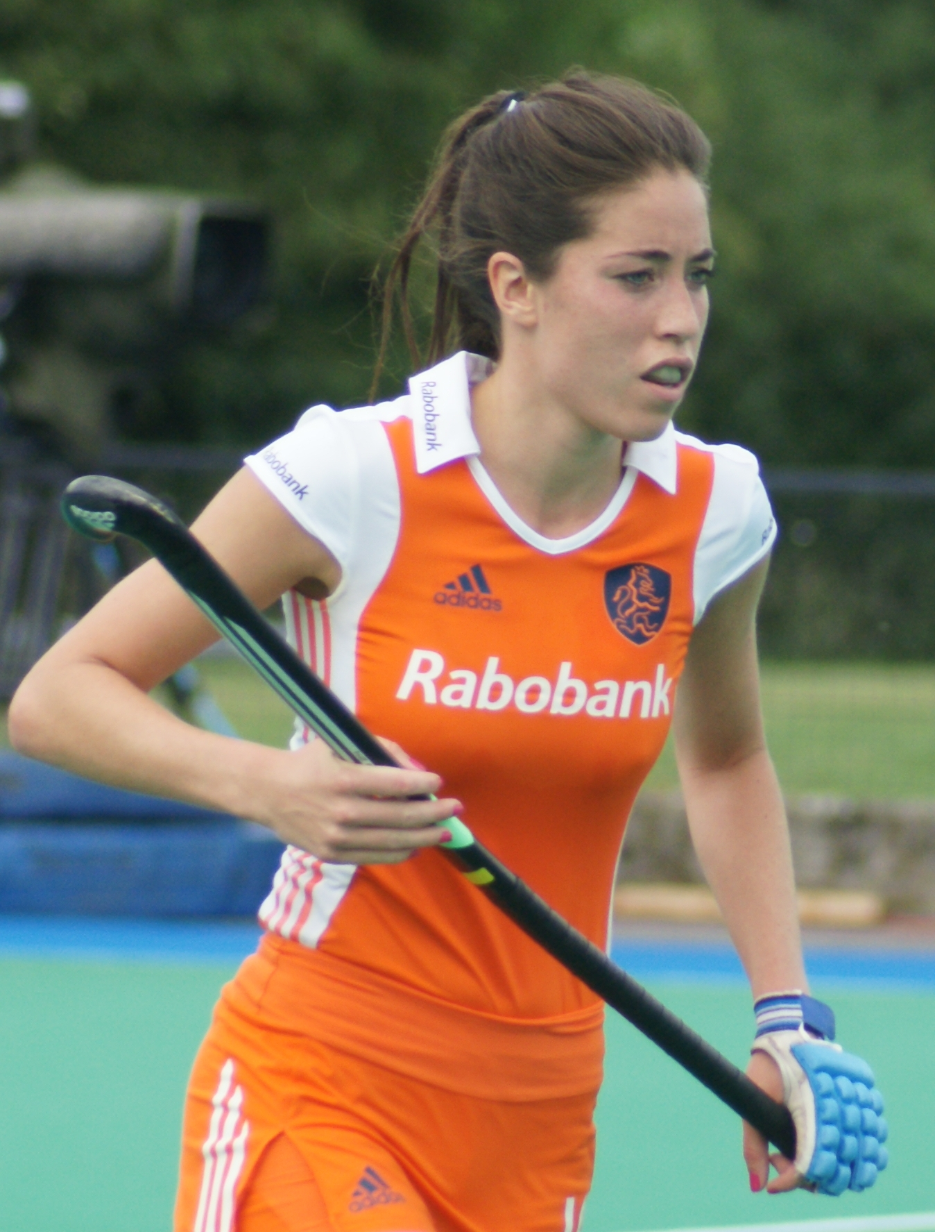 Naomi van As